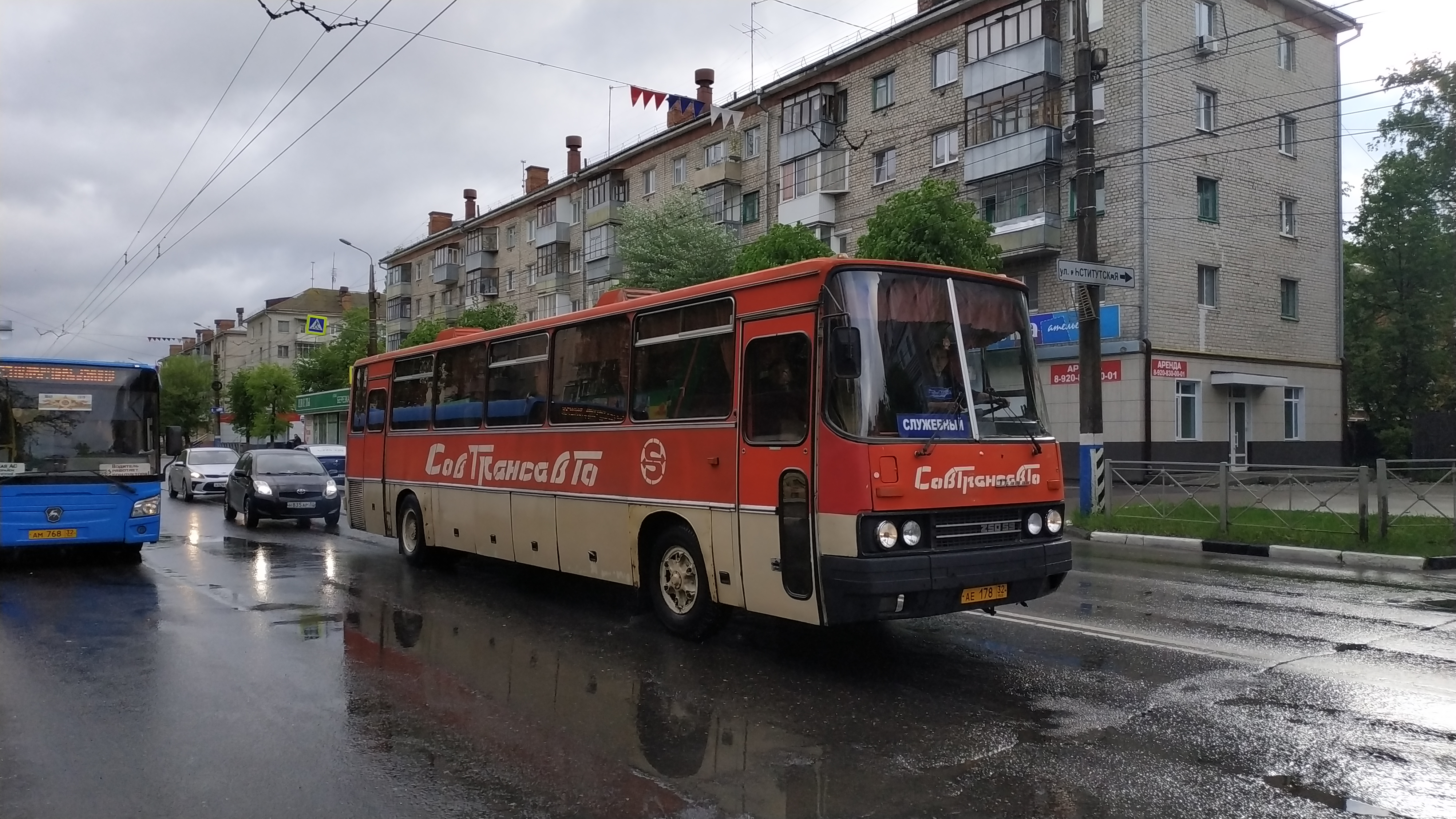 ОАО МП "Совтрансавто-Брянск-Холдинг" Ikarus 250.59 1986